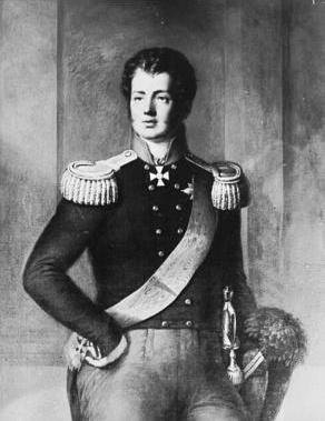 Sohn des Leopold Friedrich Franz Herzog von Anhalt